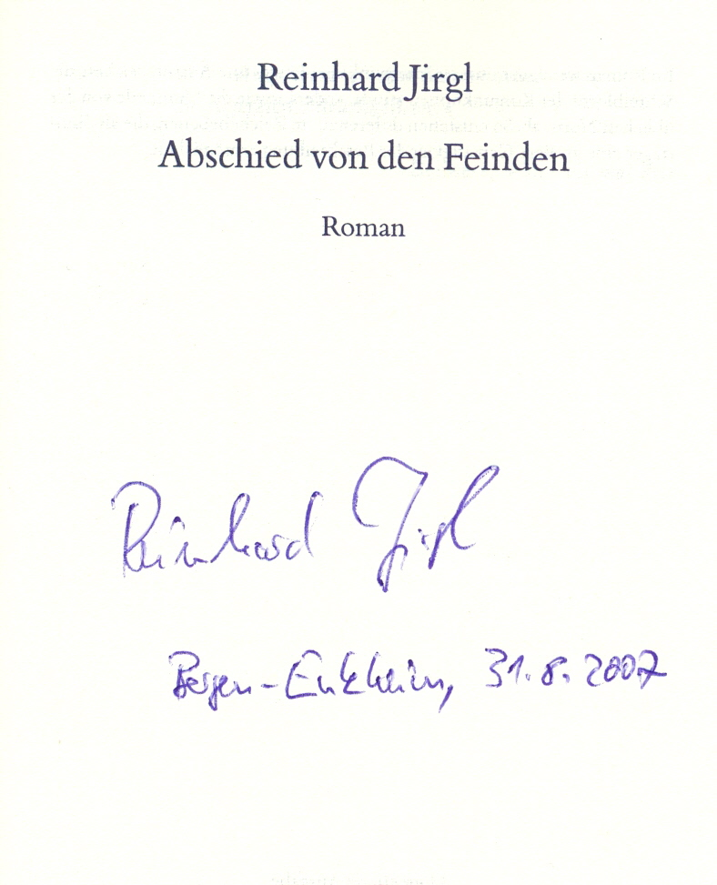 Autograph von Reinhard Jirgl